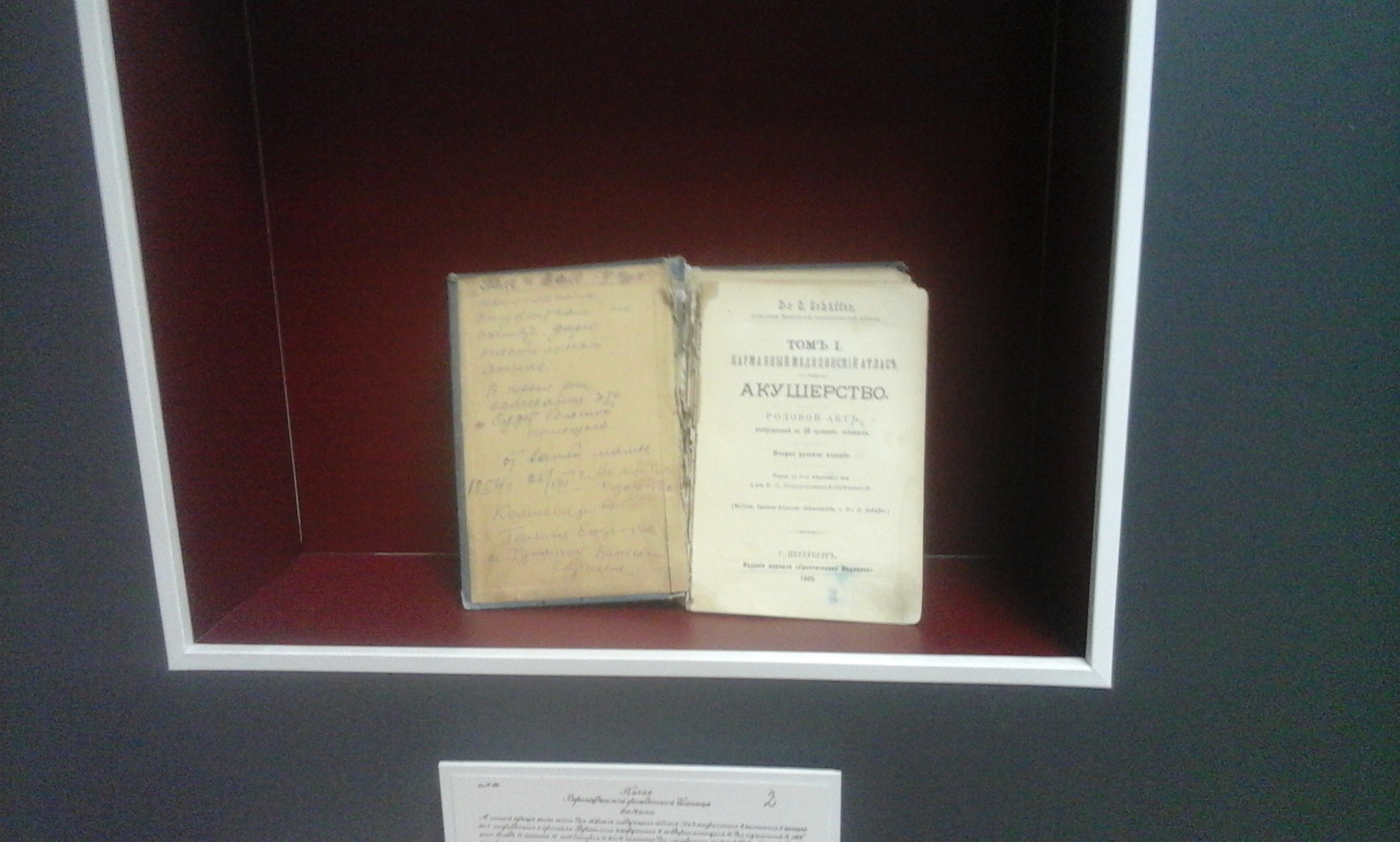 Книги по медицине